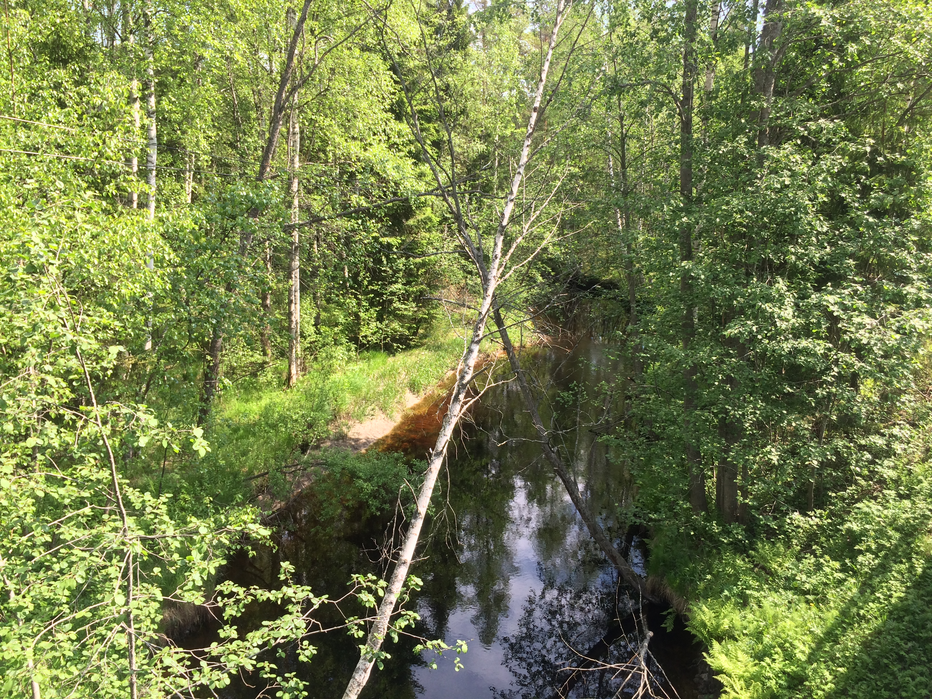 Койринйоки